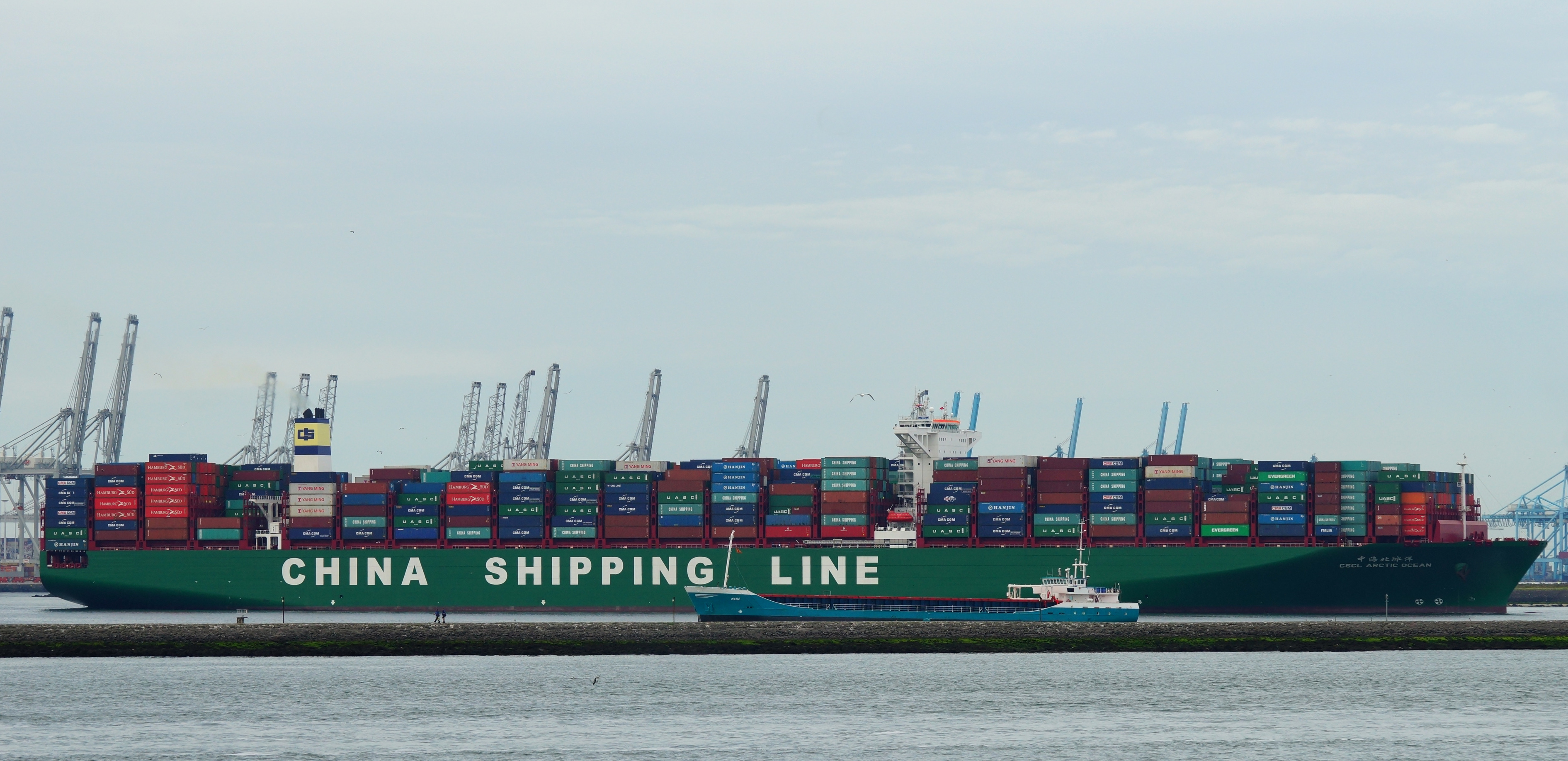 Calandkanaal 11-8-2015